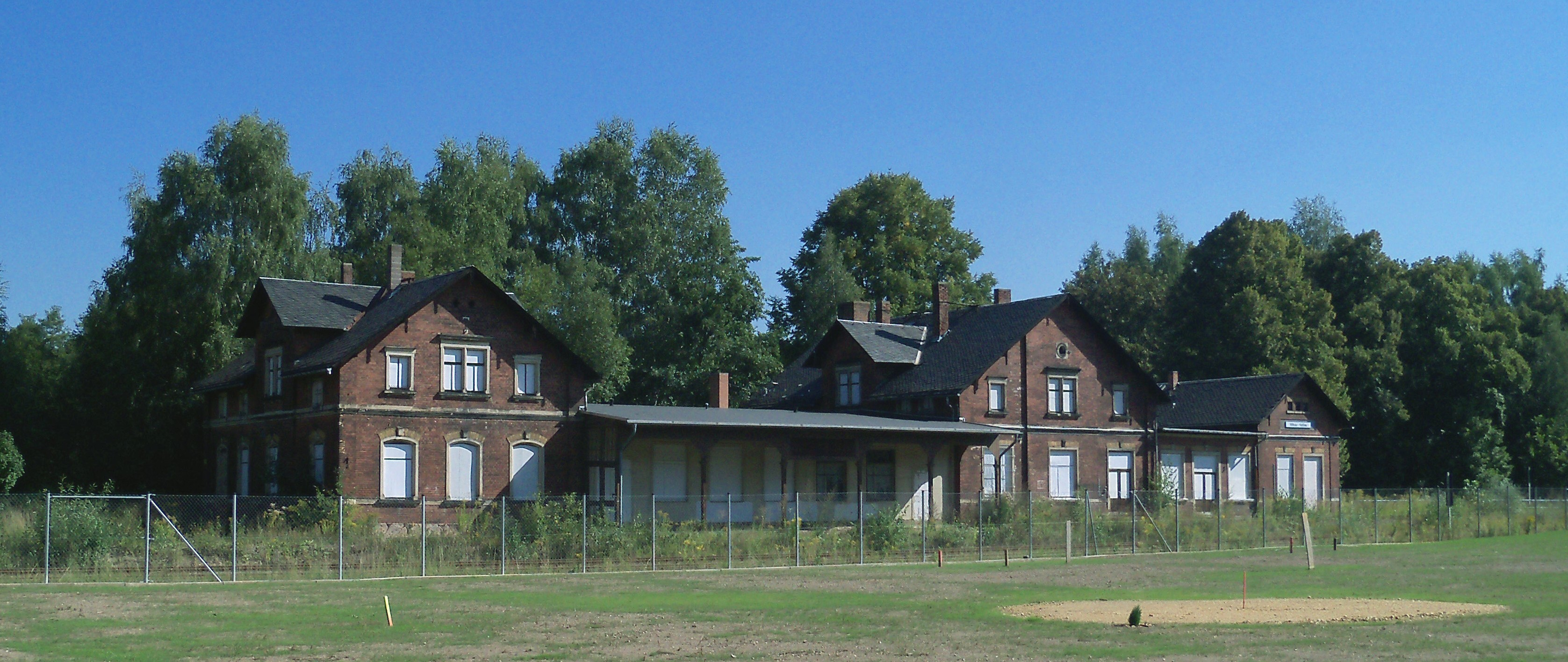 das im Jahr 2007 geschlossene Gebäude des Bahnhof Wilkau-Haßlau